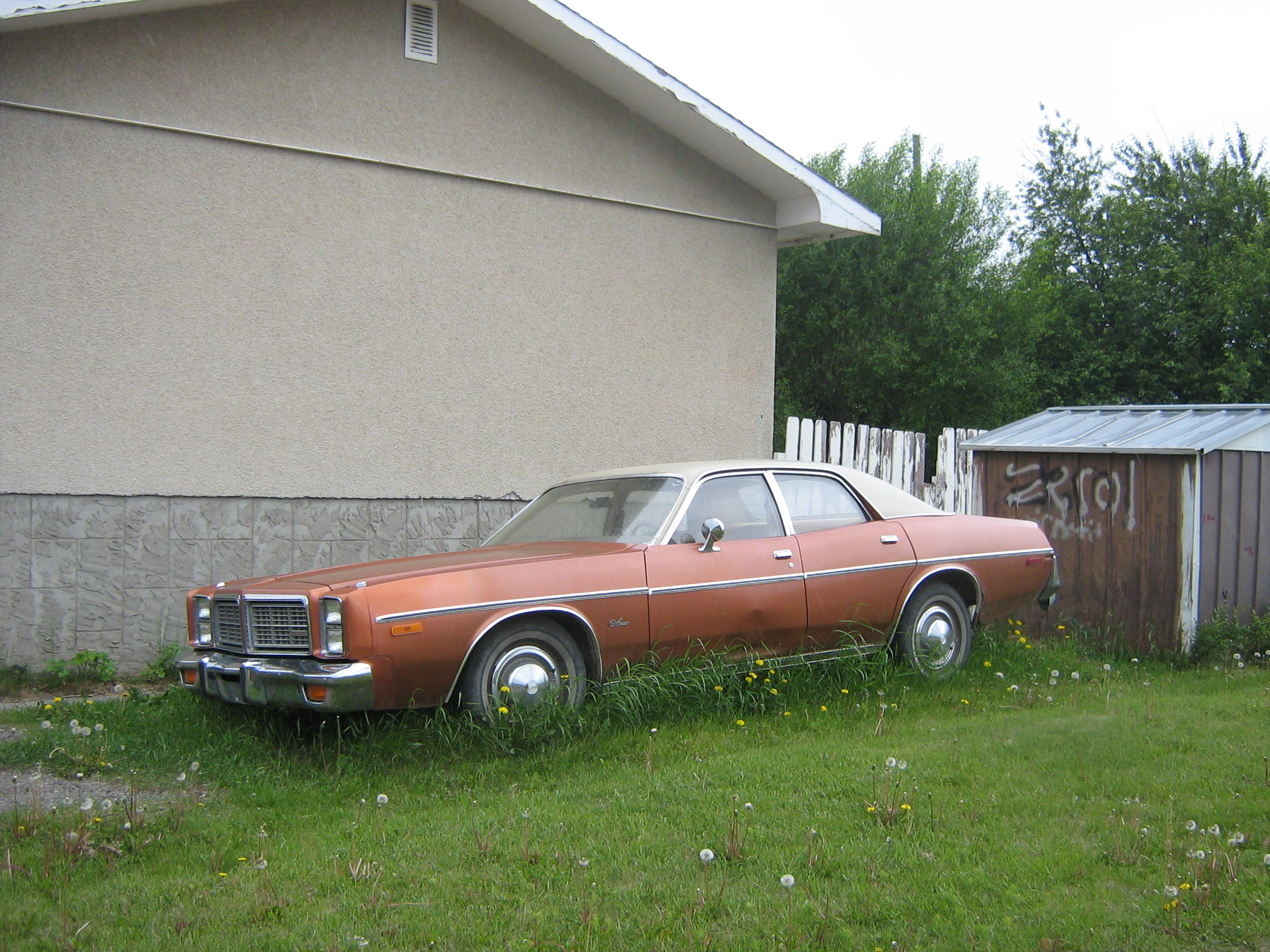 1977 Dodge Monaco 4-door sedan